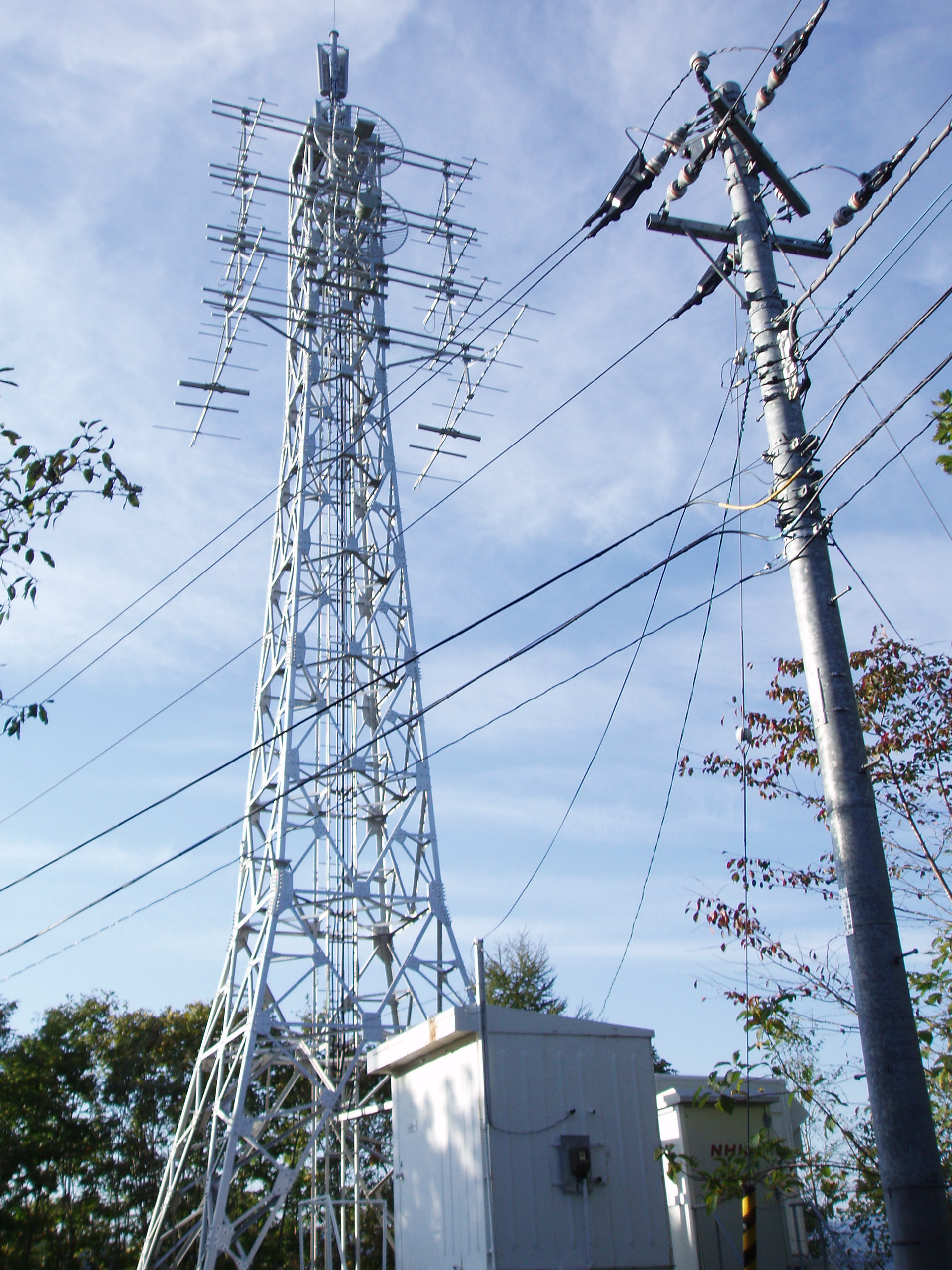 阿寒中継局（アナログ・デジタル）